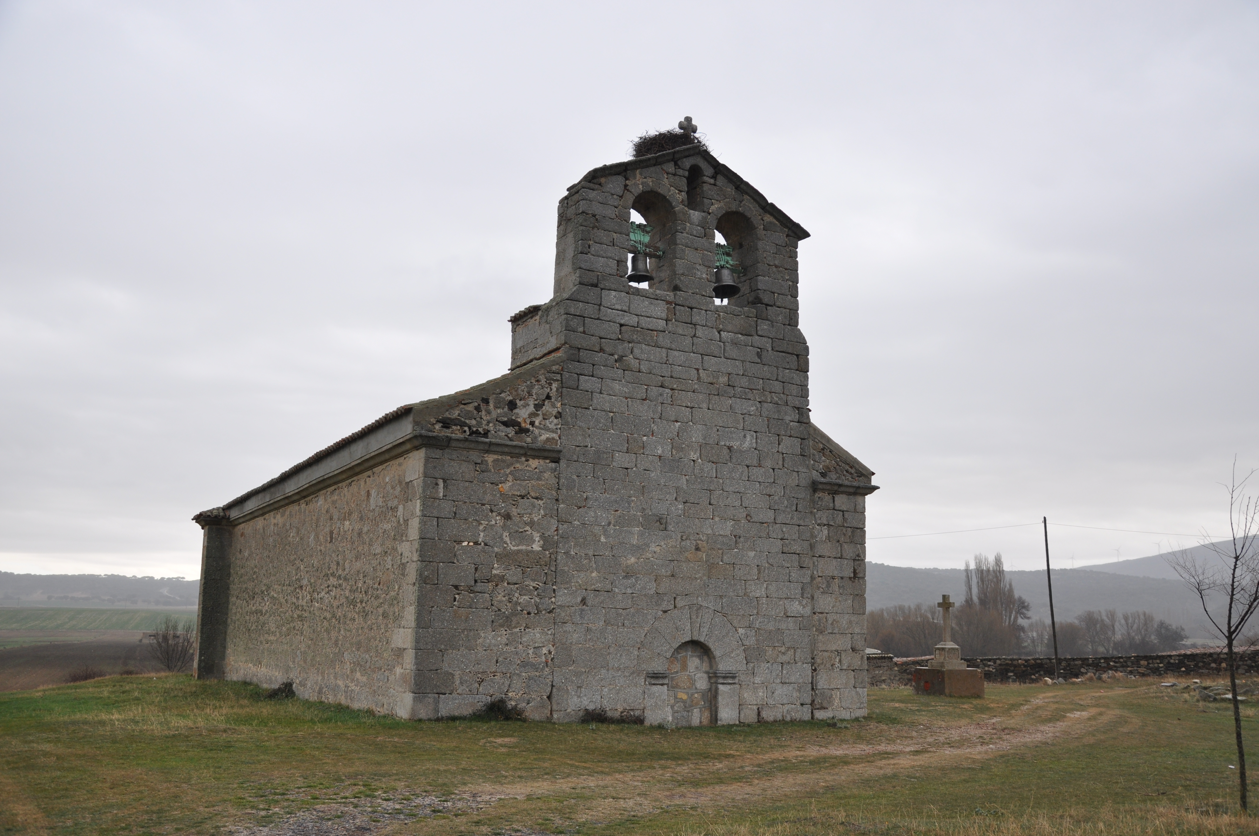 Espadaña de la iglesia parroquial de Santo Domingo de Guzmán, Muñico, Ávila, España